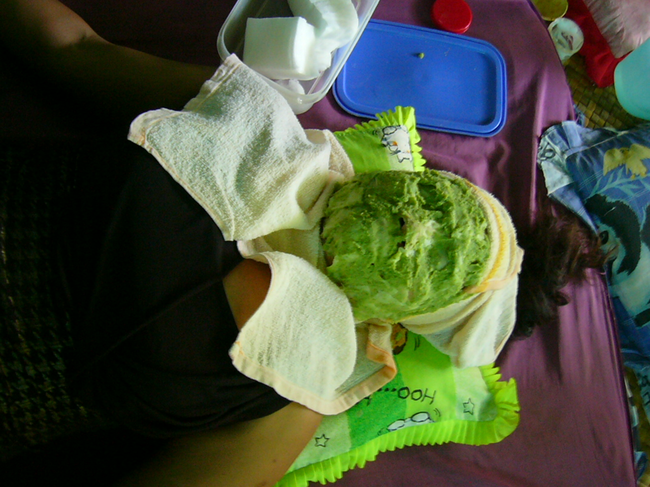 Gesichtskosmetik